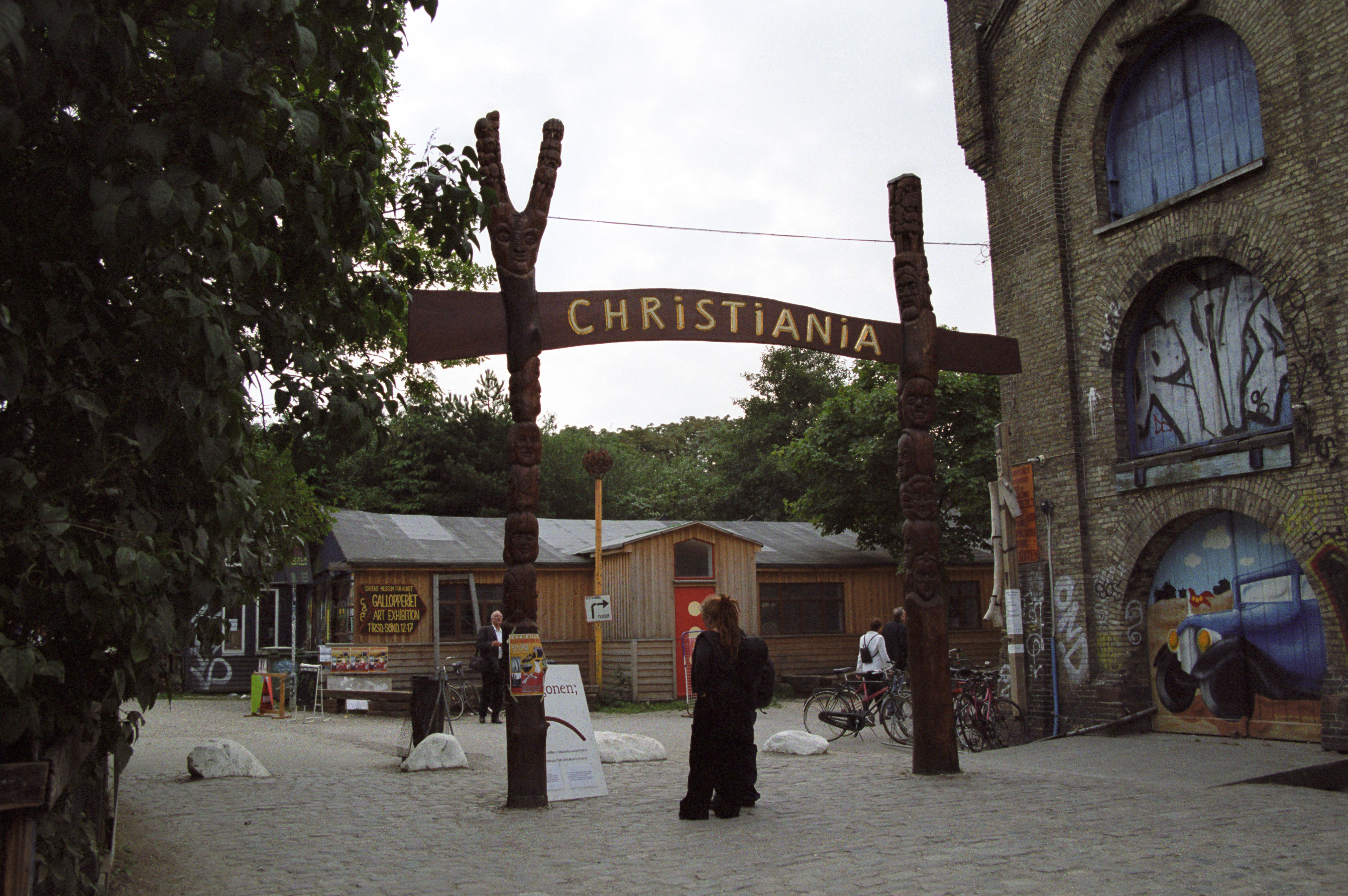 L'entrée de la ville de Christiania en septembre 2003. Image de Bruno Jargot : Bruno accepte de passer ses images de CC-BY-NC-SA à CC-BY-SA pour wikipédia.